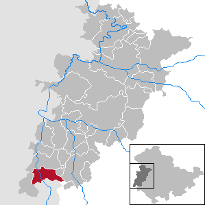 Schleid in Thuringia - Wartburgkreis